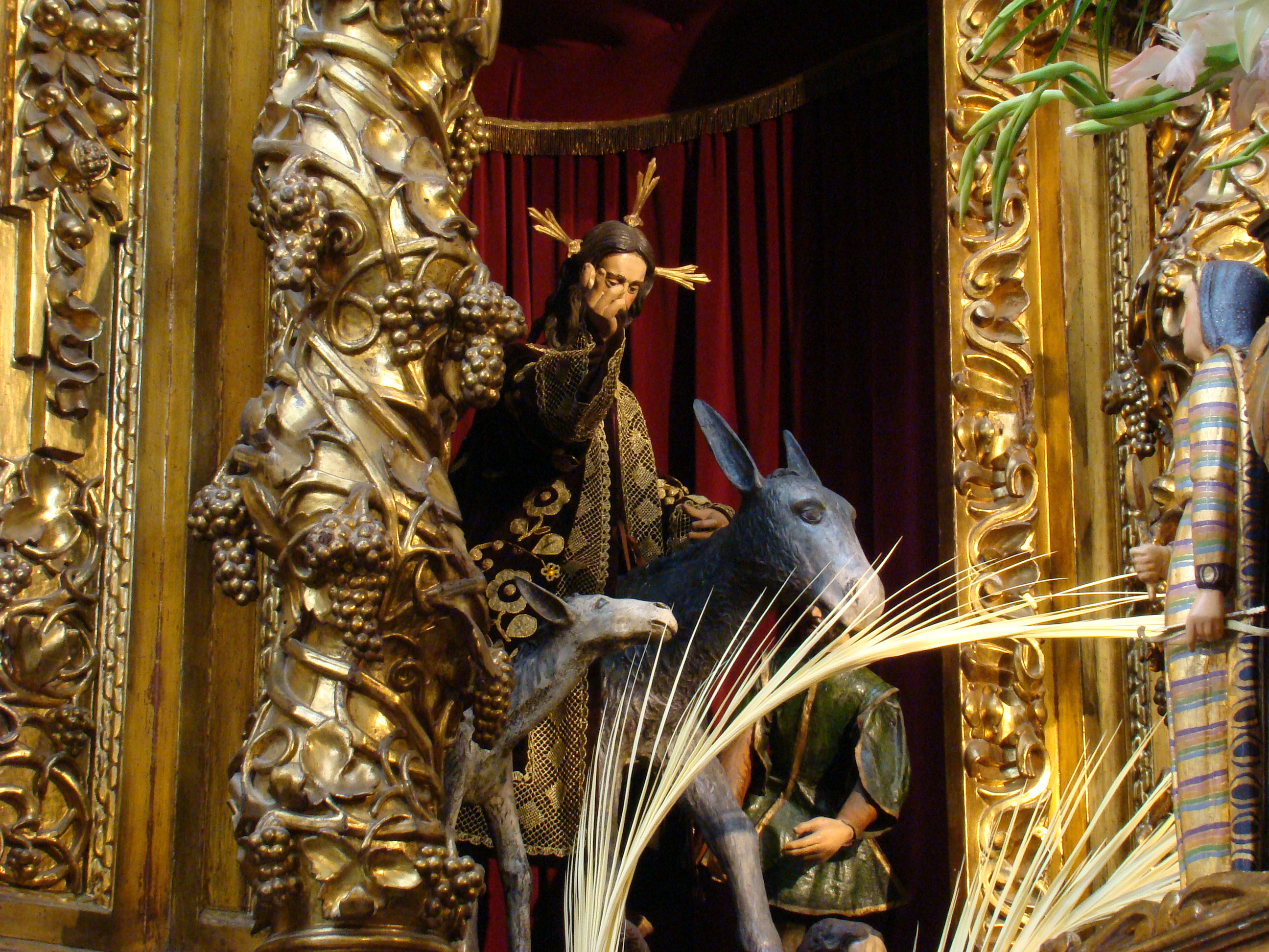 Valladolid (España). Paso procesional llamado la Borriquilla que representa la entrada de Jesús en Jerusalén. El autor es Francisco Giralte, hecho en papelón, siglo XVI-XVII. Pertenece a la cofradía de la Vera Cruz.